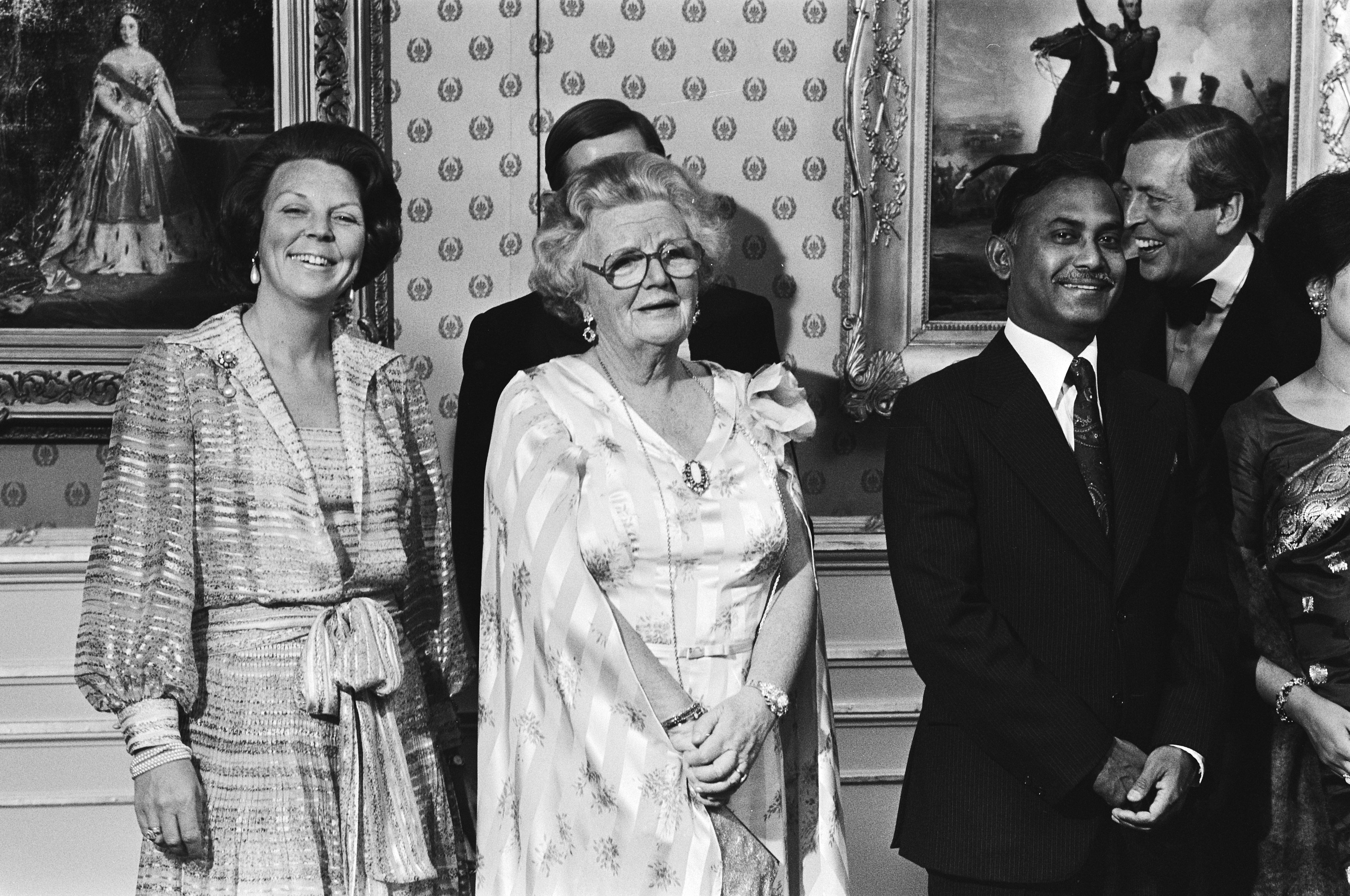 Collectie / Archief : Fotocollectie Anefo Reportage / Serie : President Ziaur Rahman van Bangladesh en echtgenote in het land Beschrijving : Statiefoto op paleis Soestdijk. V.l.n.r. Beatrix, H.M., van Vollenhoven, Ziaur Rahman, Claus, Mw. Begem Ziaur Rahman, Bernhard en Margriet Datum : 23 april 1979 Locatie : Baarn, Soestdijk, Utrecht (prov) Trefwoorden : groepsprotretten, staatsbezoeken Persoonsnaam : Beatrix, prinses, Bernhard (prins Nederland), Claus, prins, Margriet, prinses, Vollenhoven, Pieter van, Ziaur Rahman, Begem Fotograaf : Suyk, Koen / Anefo Auteursrechthebbende : Nationaal Archief Materiaalsoort : Negatief (zwart/wit) Nummer archiefinventaris : bekijk toegang 2.24.01.05 Bestanddeelnummer : 930-2280